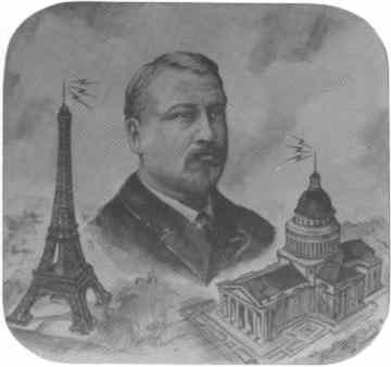 French industrialist and engineer Eugène Ducretet (1844-1915)